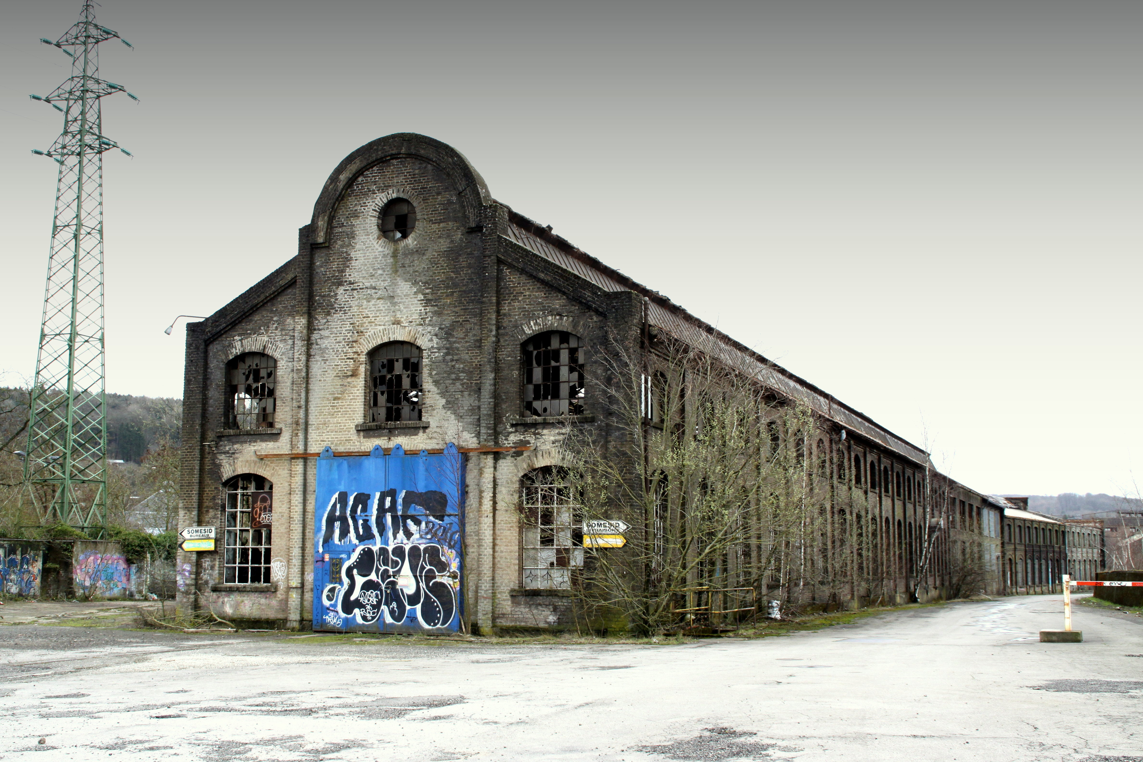 D'Handwierkergaass am Mäerz 2019